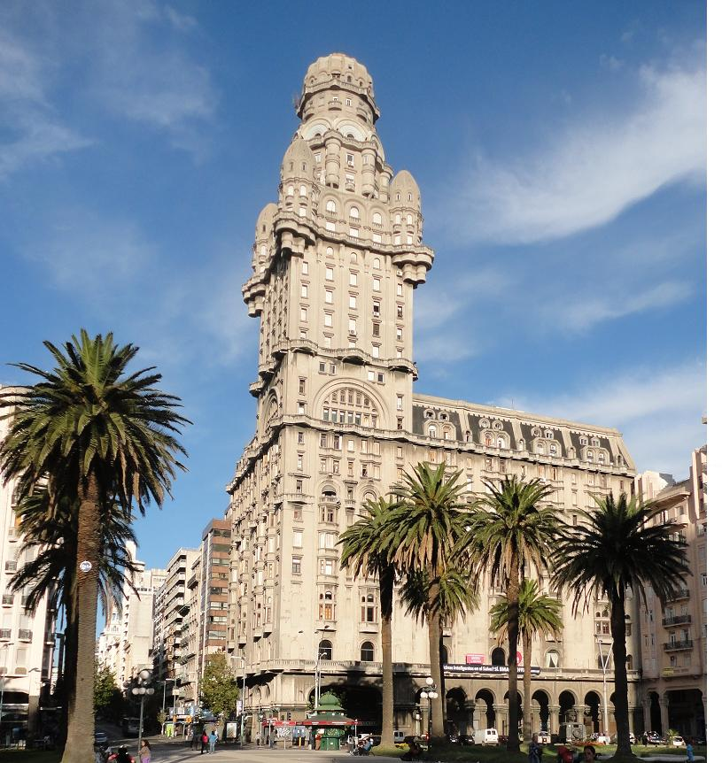 Palacio Salvo. Ubicada en el departamento de Montevideo